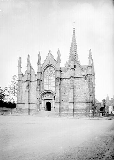 Côté Ouest de l'église Notre-Dame de Vitré par Félix Martin-Sabon.